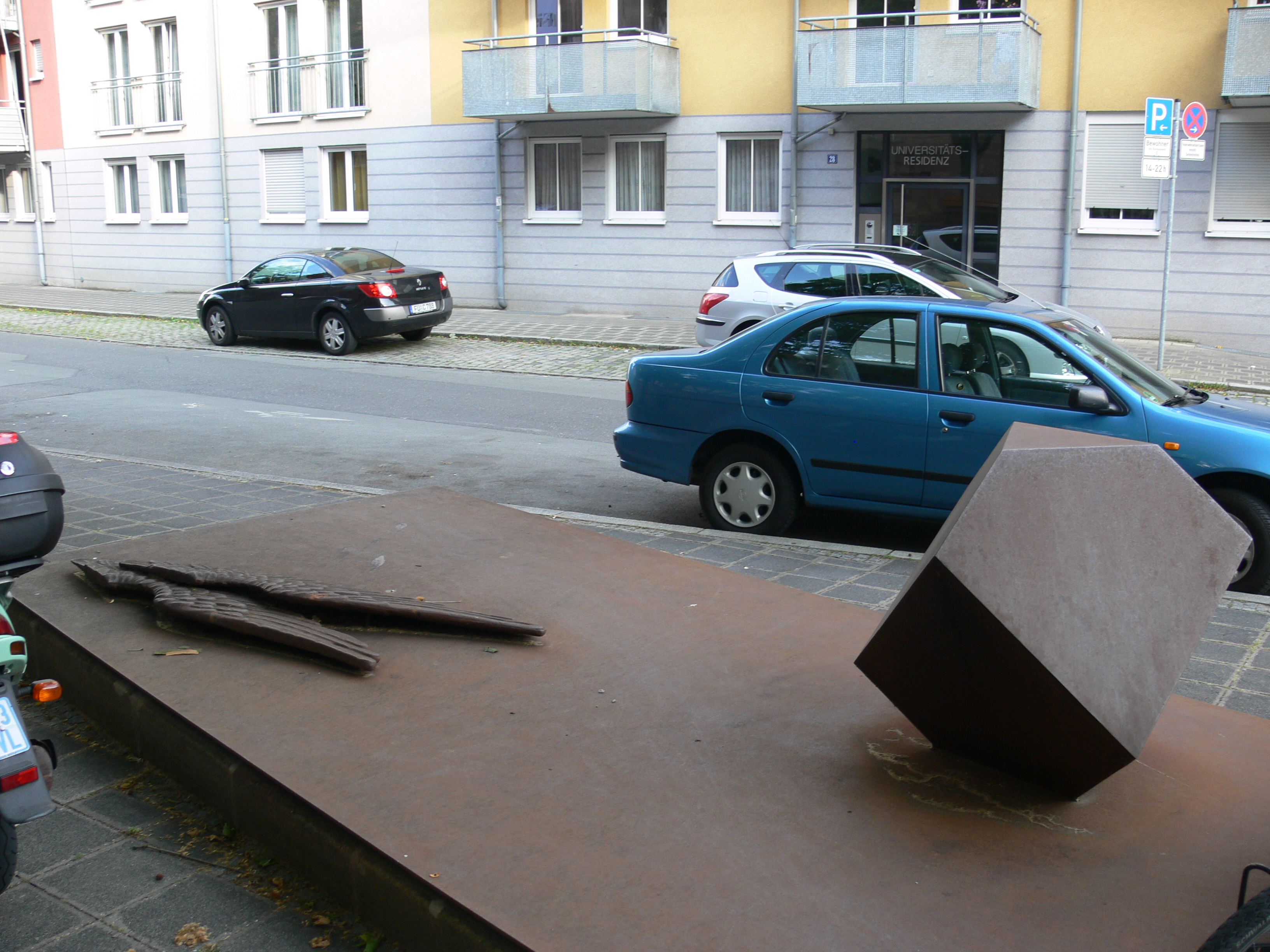 Skulpturen vor dem Museum Tucherschloss in Nürnberg Hubertus Hess: Polyeder der Melencolia I (nach Albrecht Dürers Kupferstich Melencolia I, 1514); Stahl, Eisenguss, 1999/2000 Sammlung: Museen der Stadt Nürnberg